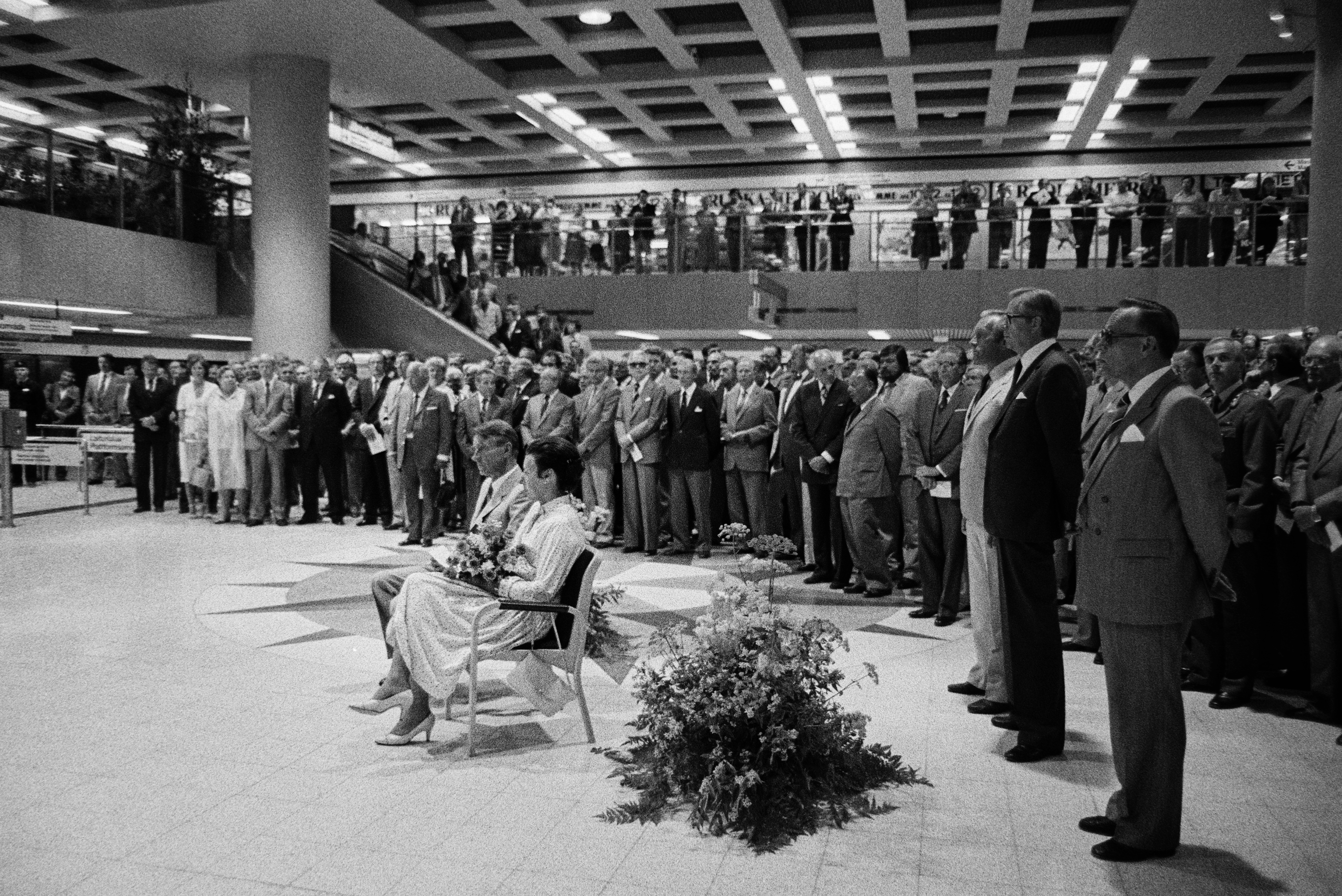 Helsingin metron avajaistilaisuus 2.8.1982. Presidenttipari Mauno ja Tellervo Koivisto istumassa kunniapaikoilla metron avajaisissa. Taustalla avajaistilaisuuden vieraita, oikealla Helsingin kaupunginvaltuuston puheenjohtajana toiminut Harri Holkeri, Helsingin ylipormestarina toiminut Raimo Ilaskivi ja metrojohtaja Unto Valtanen. Vieraat ovat kääntyneet kuulemaan metrotoimikunnan puheenjohtajan Olavi Dahlin puhetta.